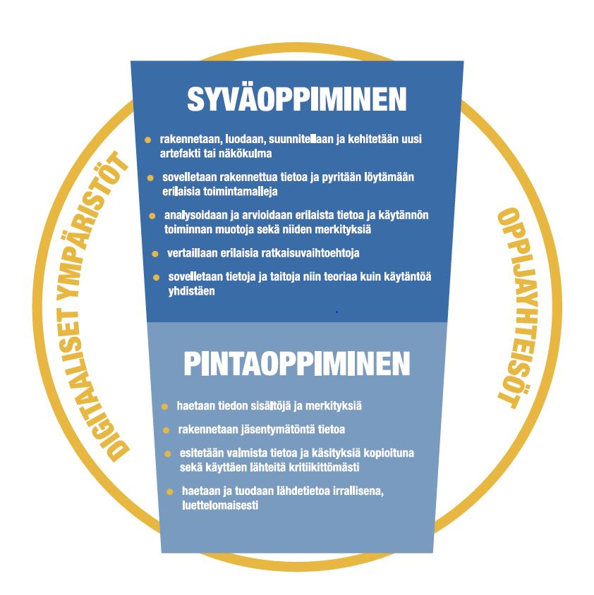 Syväoppimisen arviointiin edelleen kehitetty arviointikehys